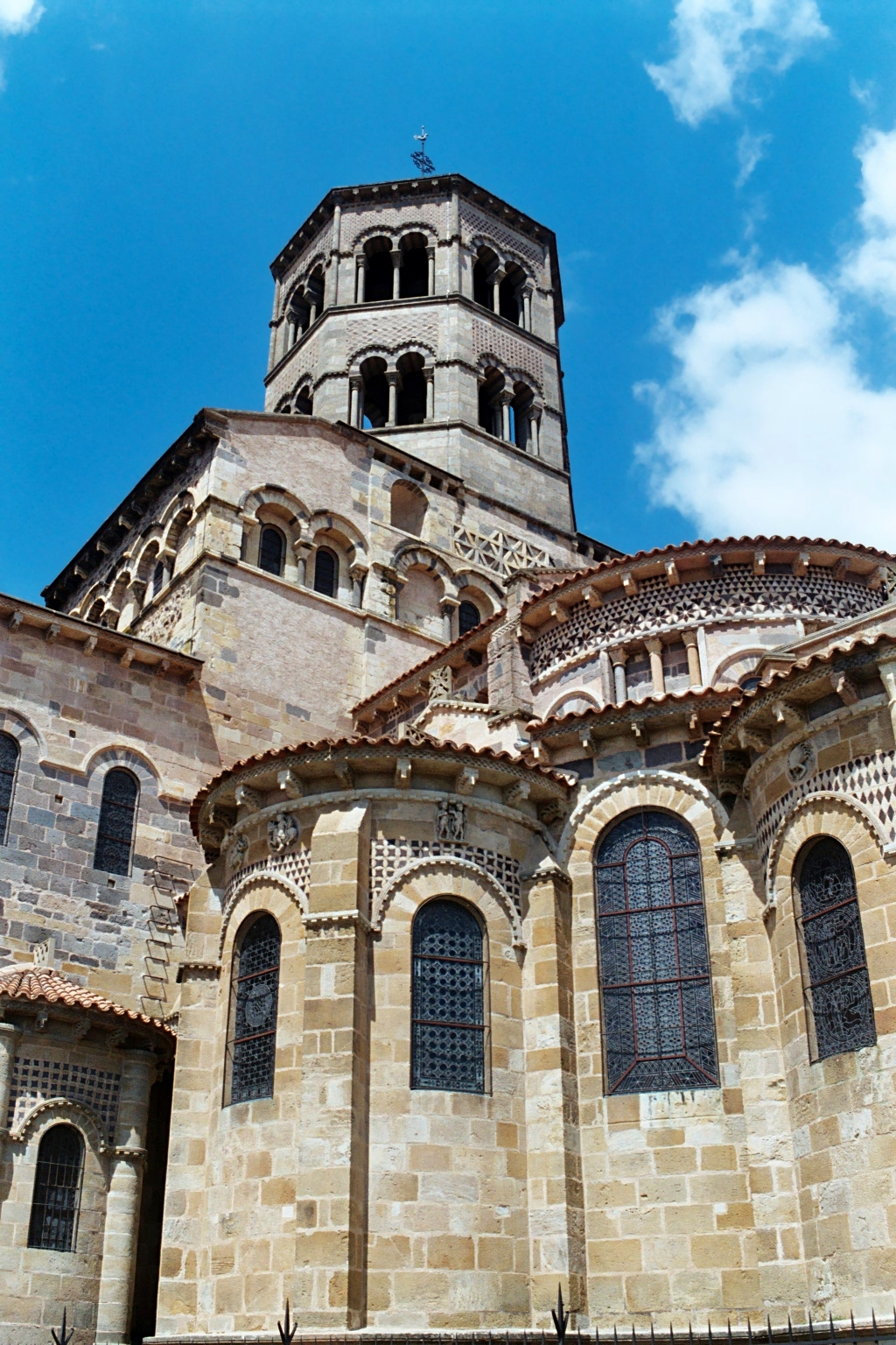 France - Auvergne - Puy-de-Dôme - Église Saint-Austremoine d'Issoire